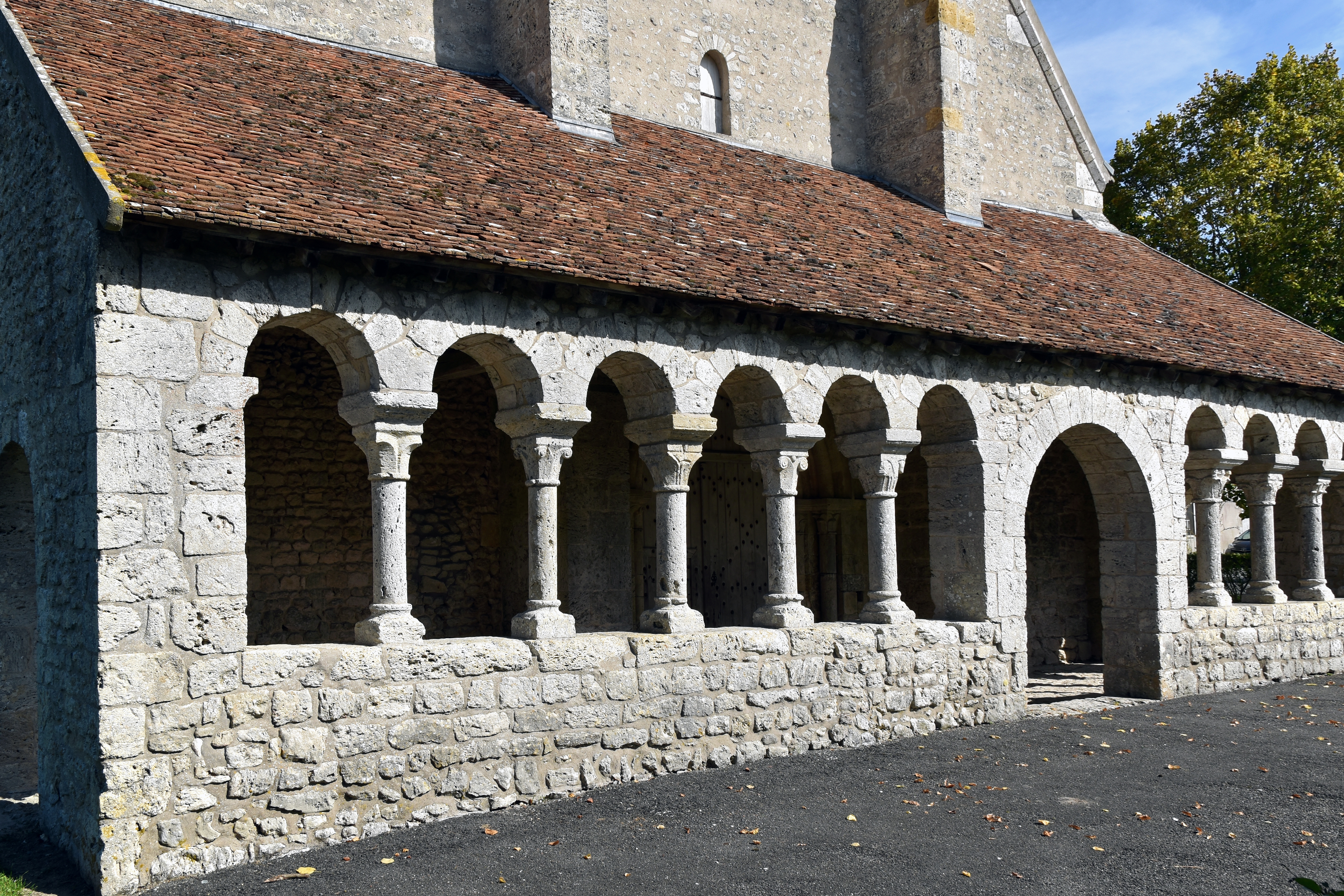 Porche de l'Église Saint-Germain de Boësses, Loiret, France .